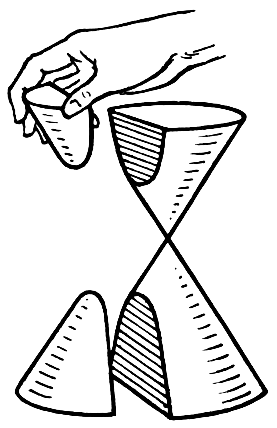 Hyperbola